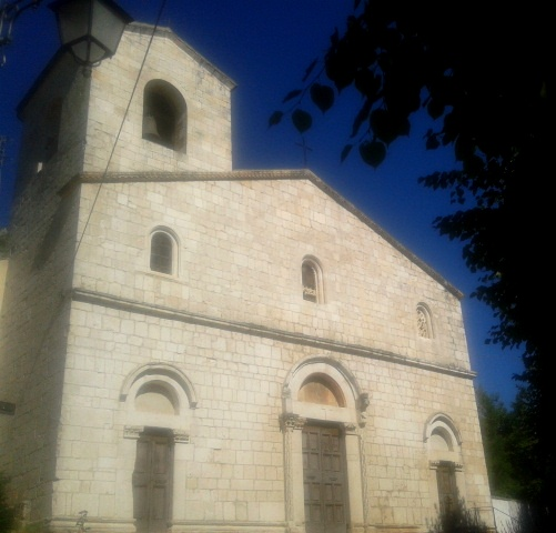 Chiesa di Santa Maria delle Grazie